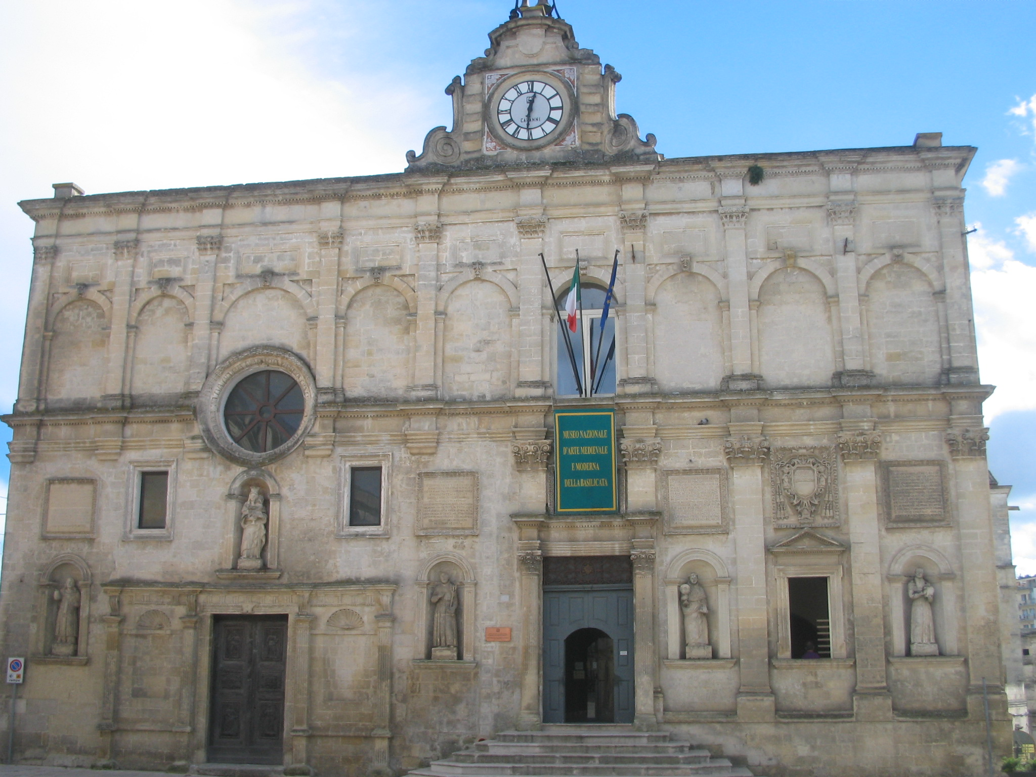 La facciata del seicentesco Palazzo Lanfranchi di Matera, sede del Museo nazionale d'arte medievale e moderna della Basilicata.